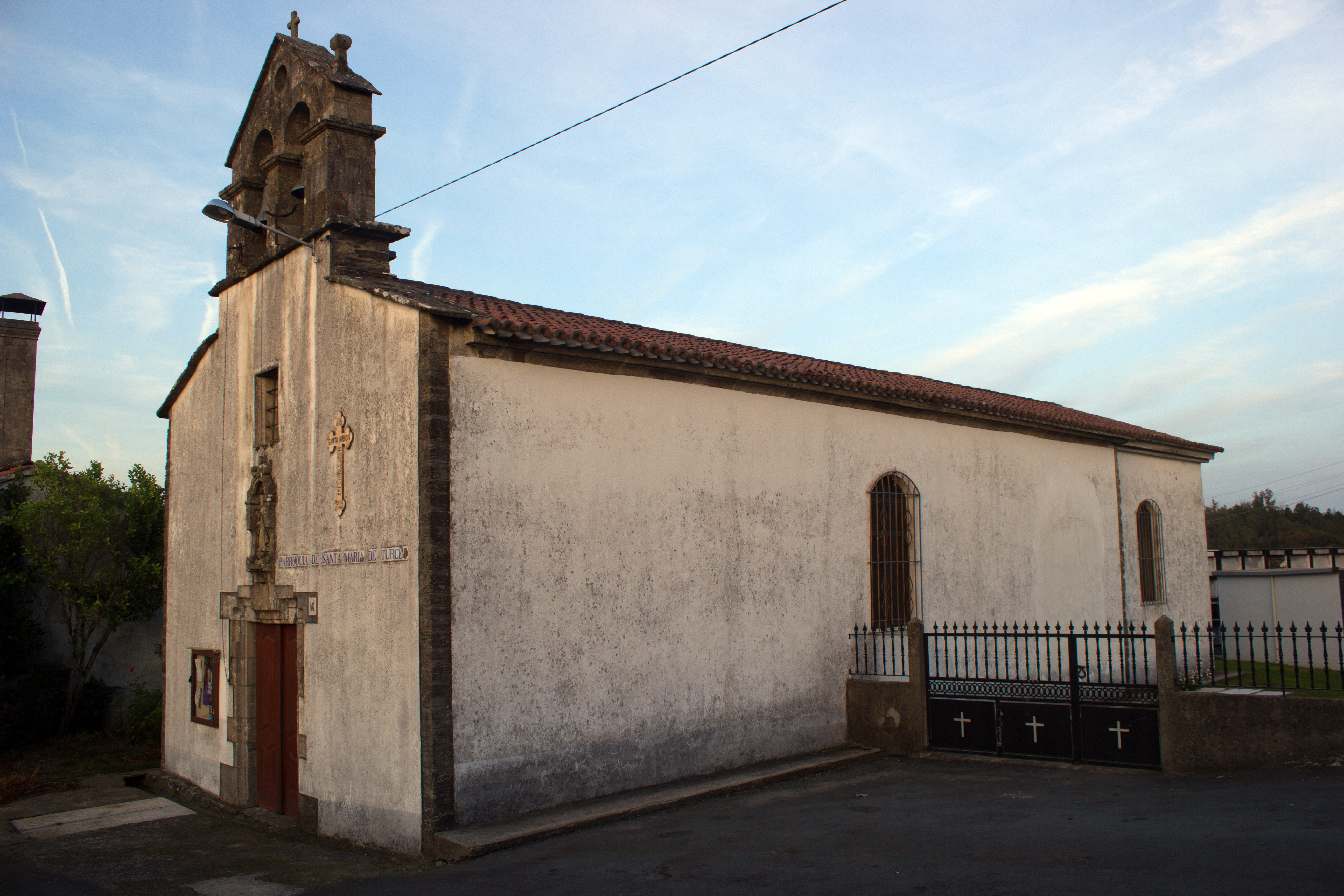 Igrexa de Santa María de Turces, no concello de Touro.